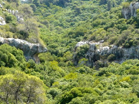 Kelach Wadi (river) on Mount Carmel, Israel נחל כלח הוא נחל בהר הכרמל באזור הכרמל הגבוה' הוא חלק מפארק הכרמל. בנחל מצוקים ואזור סבך ירוק הנקראים שווצריה הקטנה שווצריה הקטנה